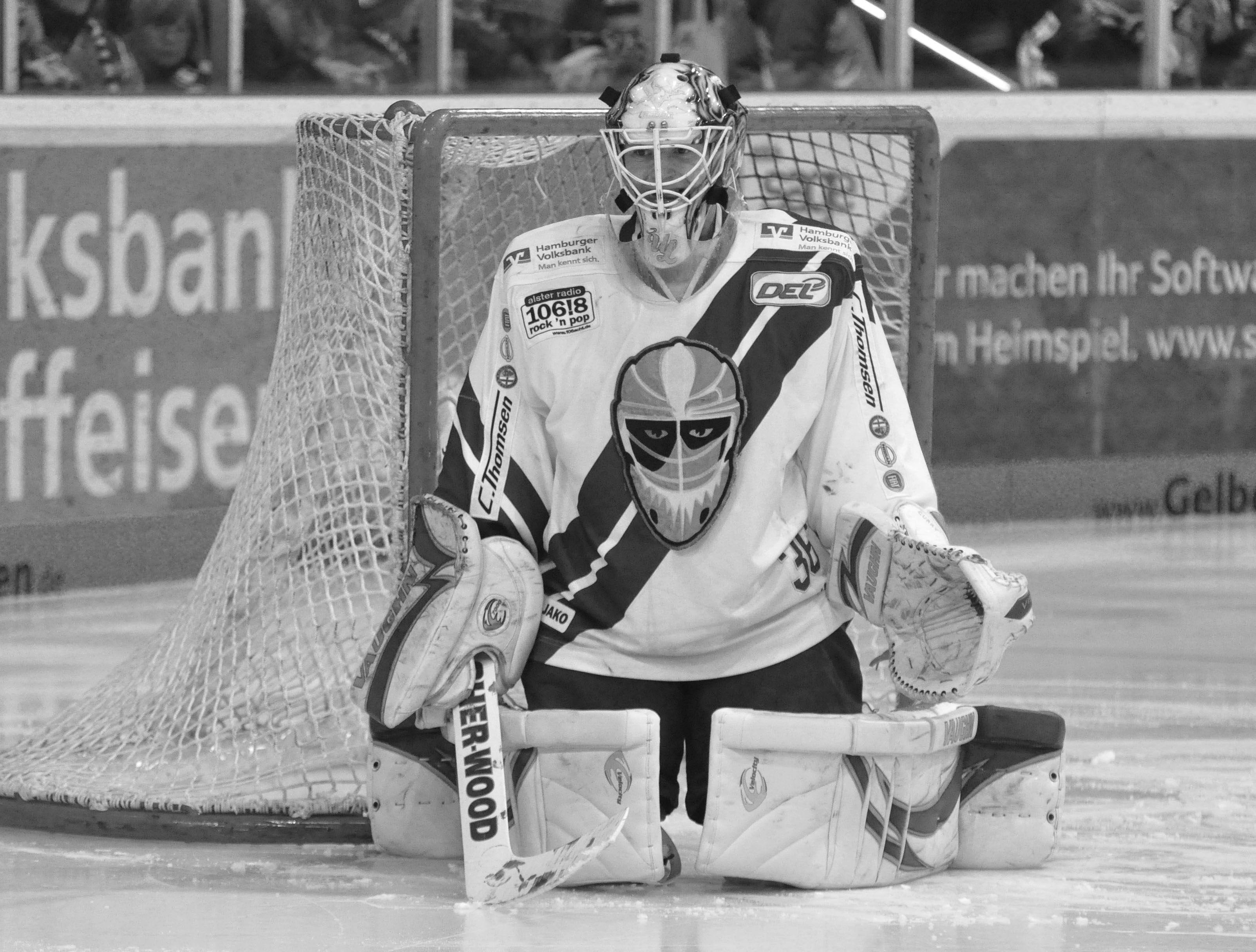 Straubing Tigers - Hamburg Freezers 26.02.2012 DEL Deutsche Eishockey Liga